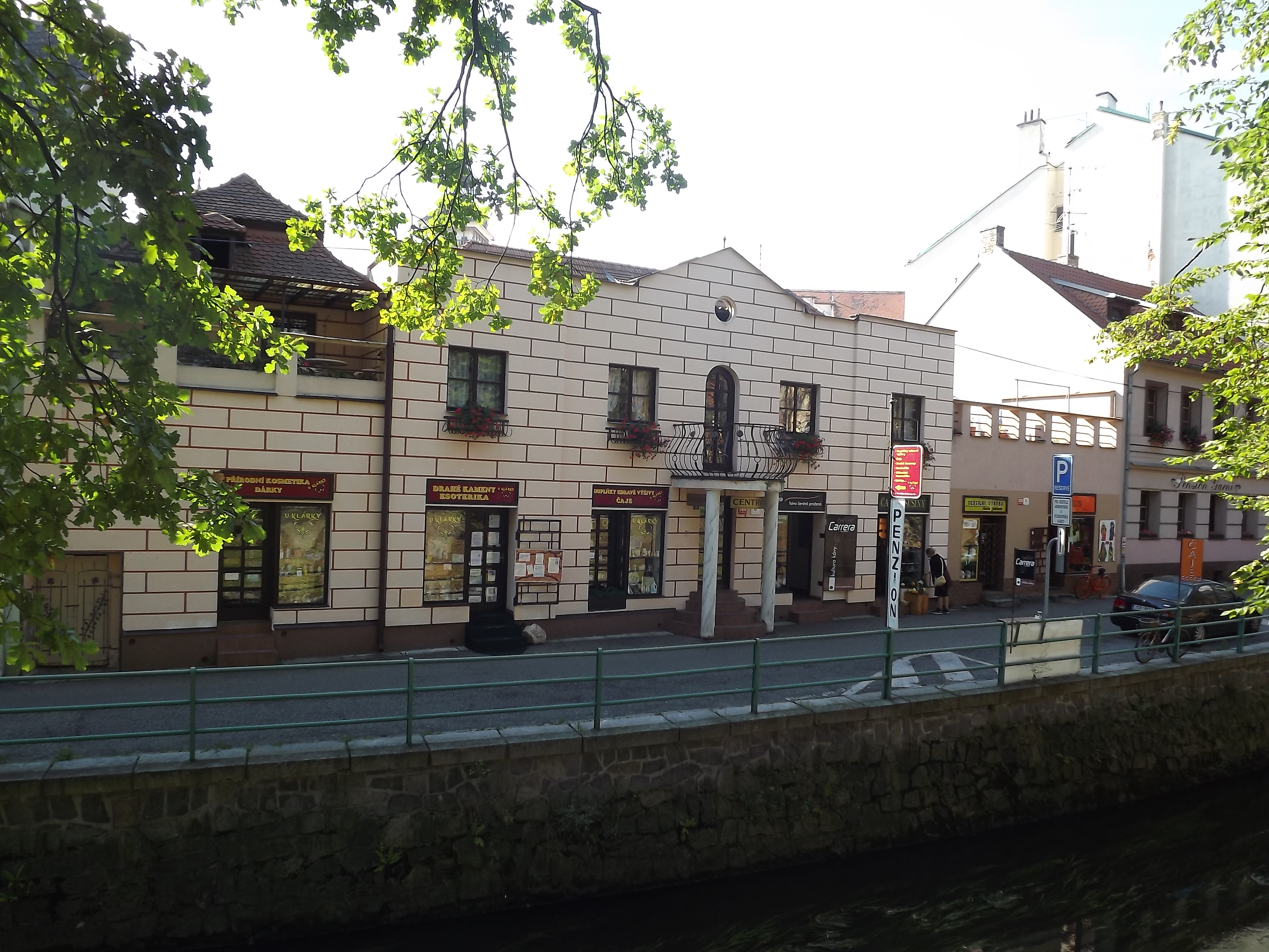 rodinný dům, Na Mlýnské stoce 360/6, České Budějovice